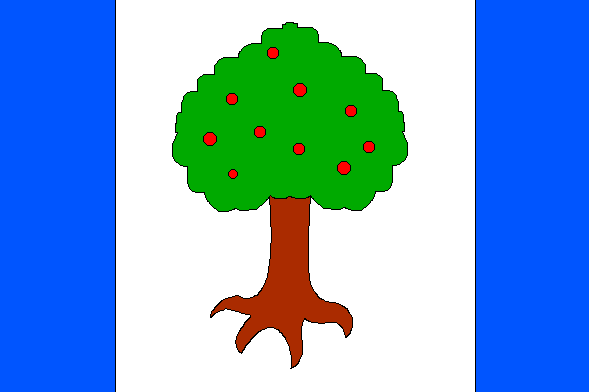 Vlajka měta Luhačovice. List tvoří tři svislé pruhy – modrý, bílý a modrý v poměru 1:3:1. Uprostřed bílého pruhu je jabloň z městského znaku vysoká šest sedmin šířky listu. Zdroj: tam převzato z Petr Exner: Vexilologický lexikon Prapory obcí ČR Do PNG převedl -df- 14:29, 26. 9. 2005 (UTC)